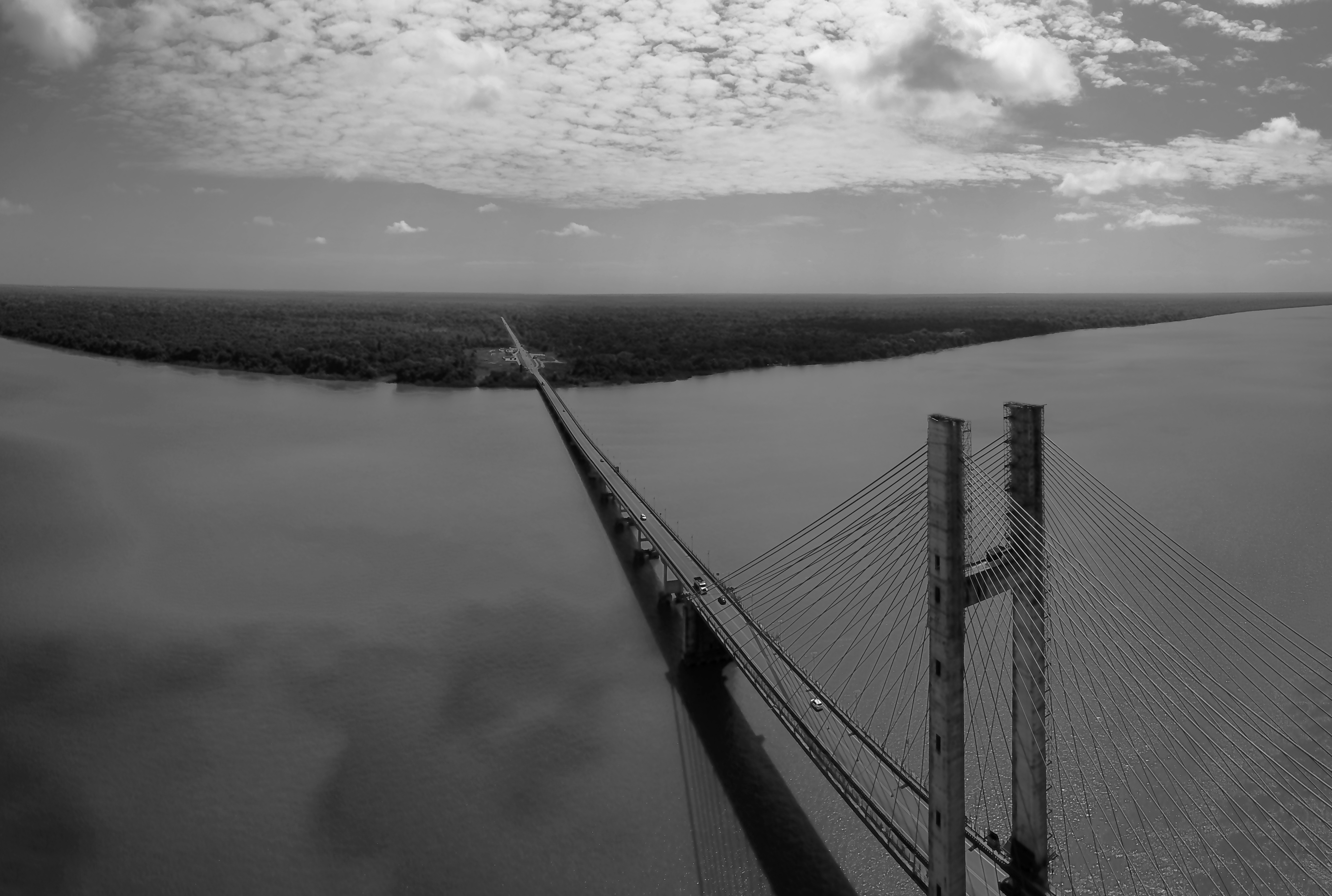 Alça Viária do Pará